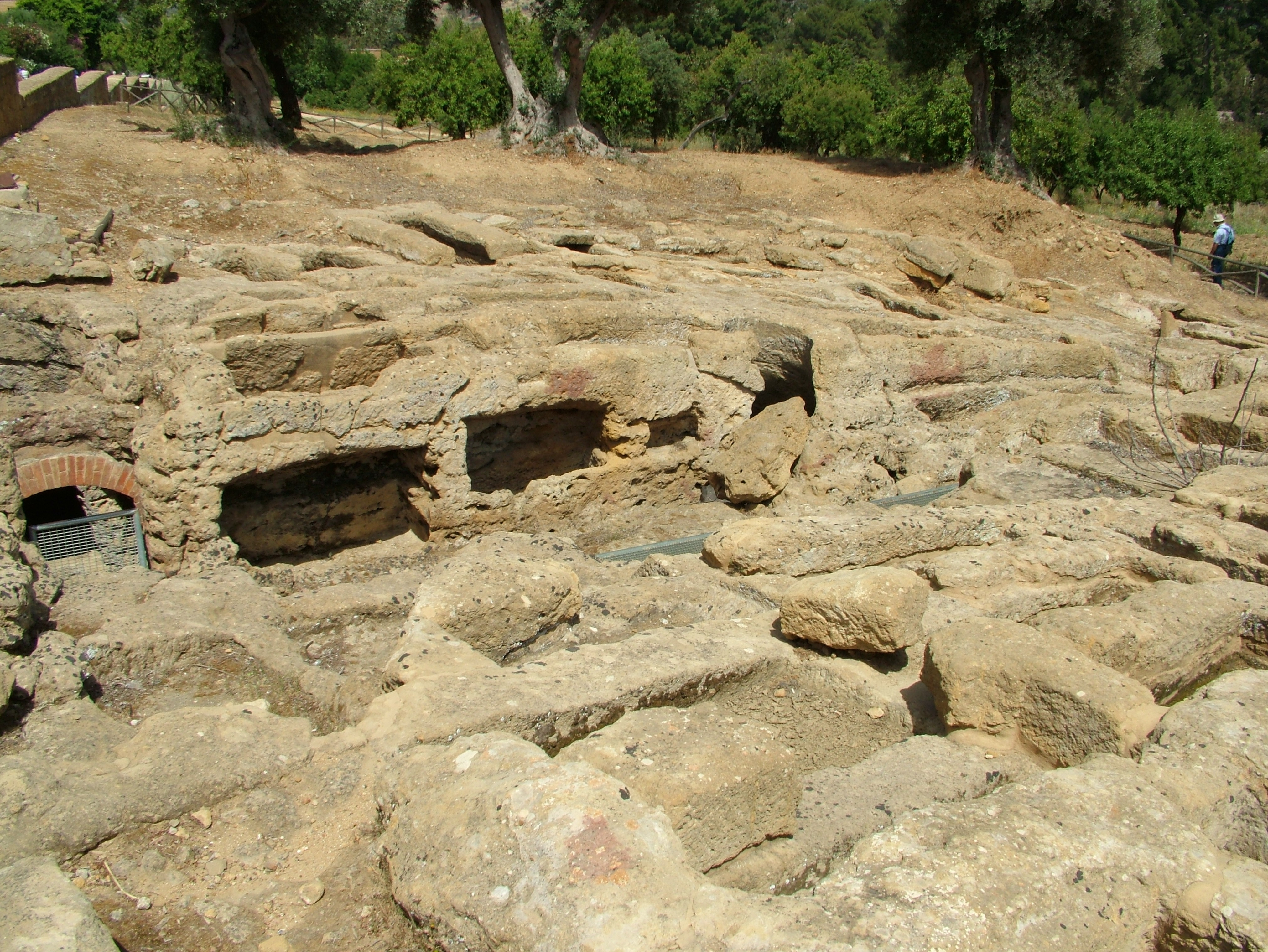 Agrigento, Sizilien Necropoli Paleocristina